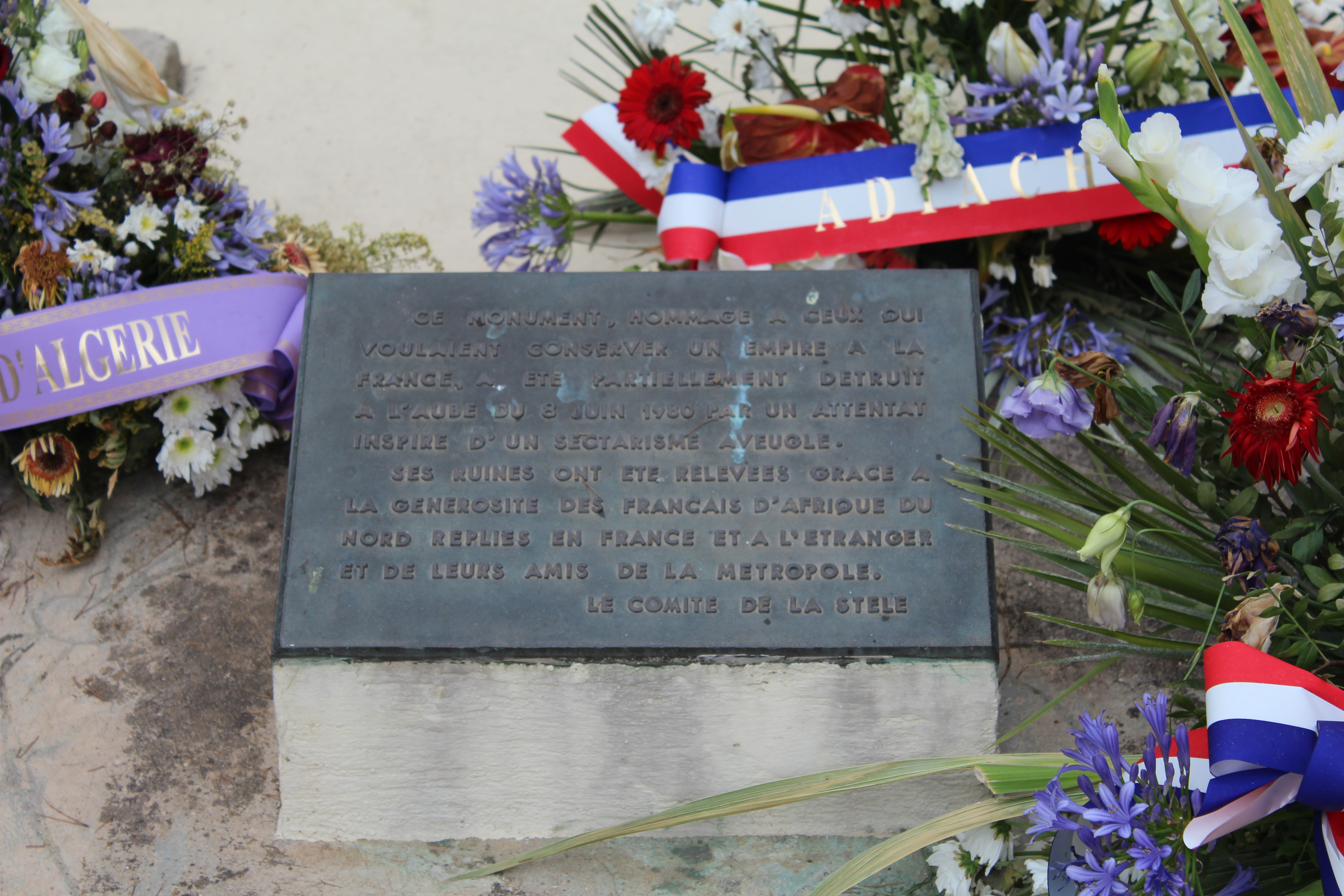 Monument aux martyrs de l'Algérie française (Toulon)